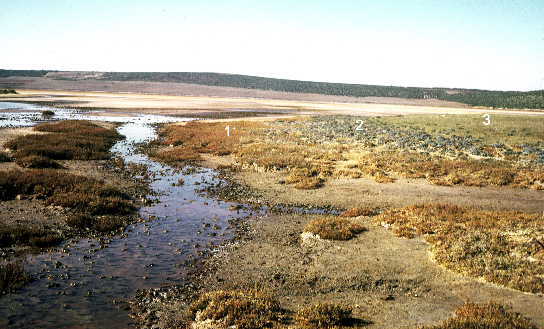 Sebkha d'Arzew (Algérie) : ceintures de végétation et importance du microrelief dans les prés salés. 1 : sur les sols les plus salés, quelques espèces hyperhalophiles comme Arthrocnemum indicum. 2 : sols un peu moins salés et plus rarement inondés avec Limonium gummiferum et, par endroits, Inula crithmoïdes (syn. Limbarda crithmoides), Suaeda fruticosa[1], ... 3 : steppes à graminées comme Lygeum spartum. Déterminations des espèces réalisées avec l'aide de R. Masson, université d'Oran. A l'arrière-plan : le Djebel el Hallouf. English ; Sebkha d'Arzew (Algeria): vegetation belts and the importance of micro-relief in salt meadows. 1: on the saltiest soils, some hyperhalophilic species such as Arthrocnemum indicum. 2: slightly less salty soils and more rarely flooded with Limonium gummiferum and, in places, Inula crithmoides (syn. Limbarda crithmoides), Suaeda fruticosa [1], ... 3: grass steppes such as Lygeum spartum. Species determinations carried out with the help of R. Masson, University of Oran. In the background: the Djebel el Hallouf.